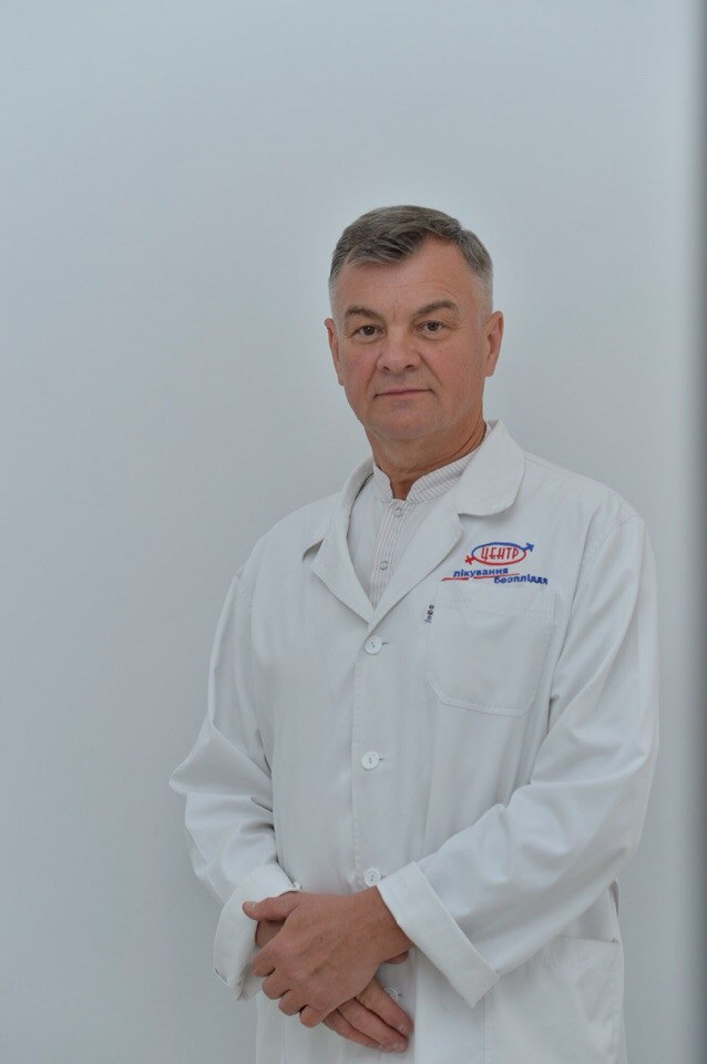 Юзько Александр Михайлович